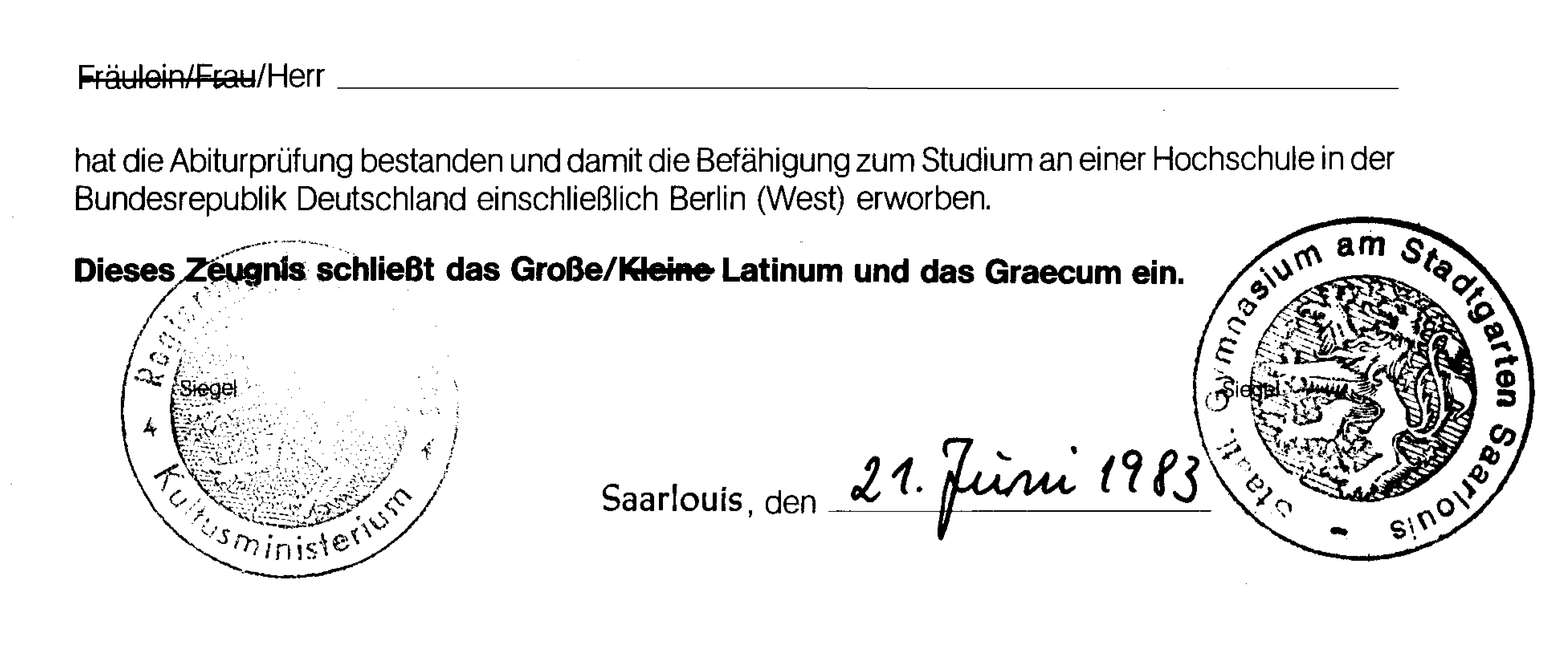 Vermerk über den Einschluss von Großem Latinum und Graecum auf einem Abiturzeugnis im Saarland (1983)